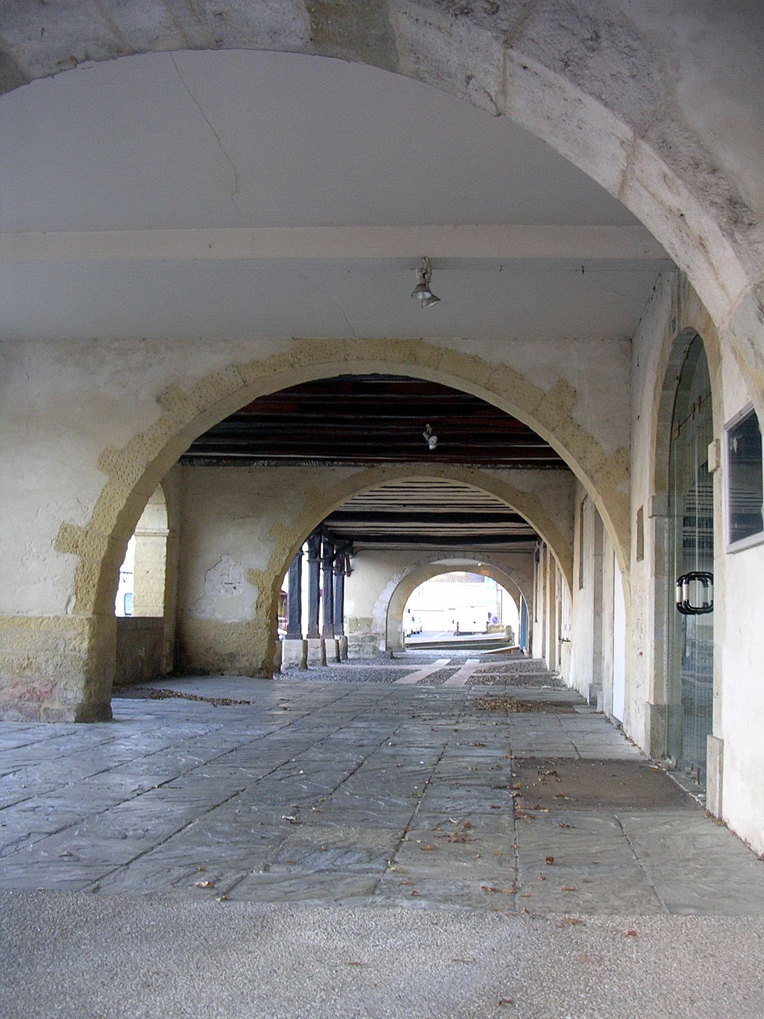 Arcades de la bastide de Grenade-sur-l'Adour (Landes, France)